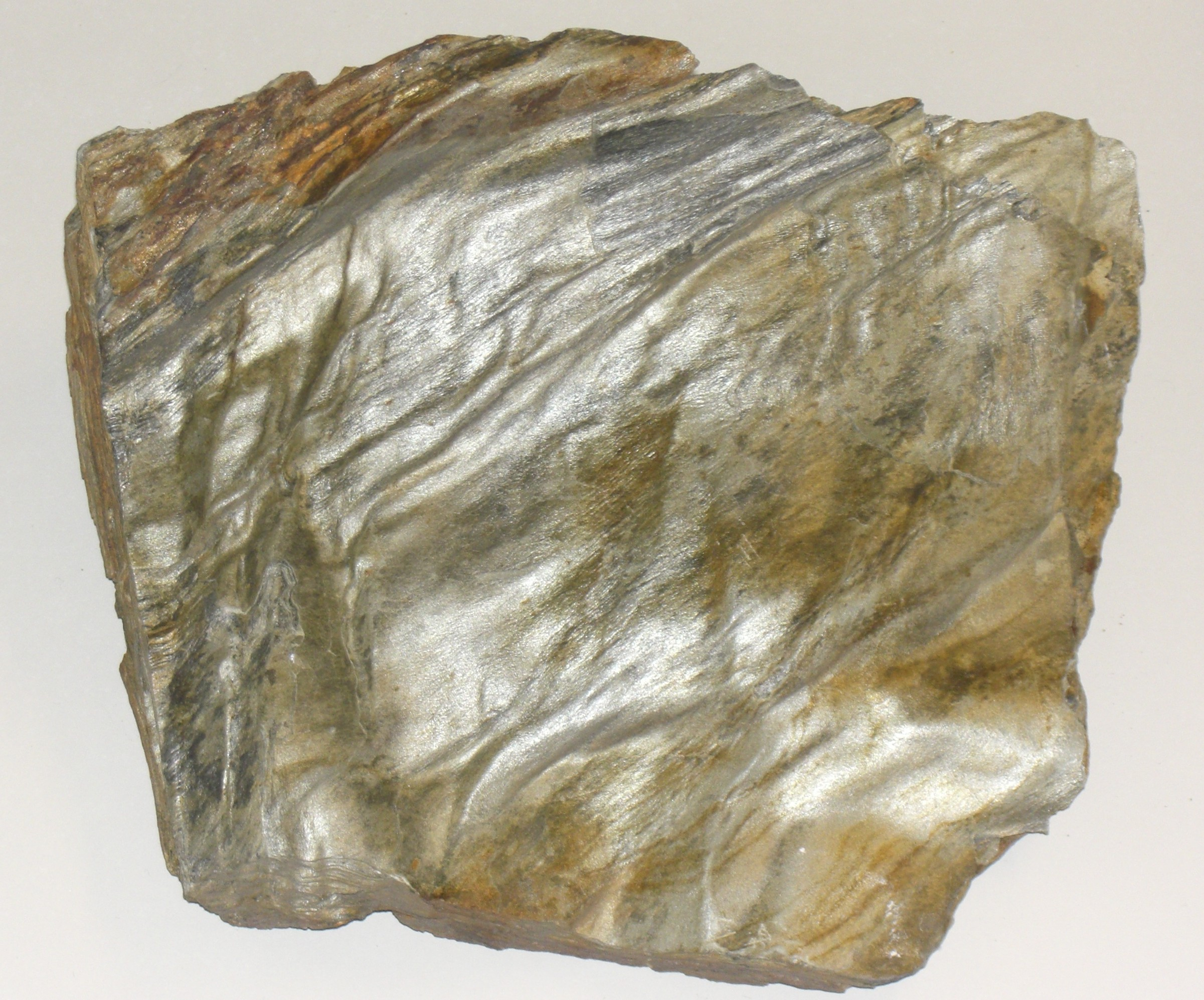 Phyllit-Handstück, 15 mal 20 cm. Herkunft: Steinbruch Hormersdorf. Die mehrfache Verfaltung der Hauptschieferung wird beim Blick auf die vorliegende Schieferungsfläche deutlich. Photographie: Chadmull, 05.02.2006. Frei für alle Verwendungszwecke.